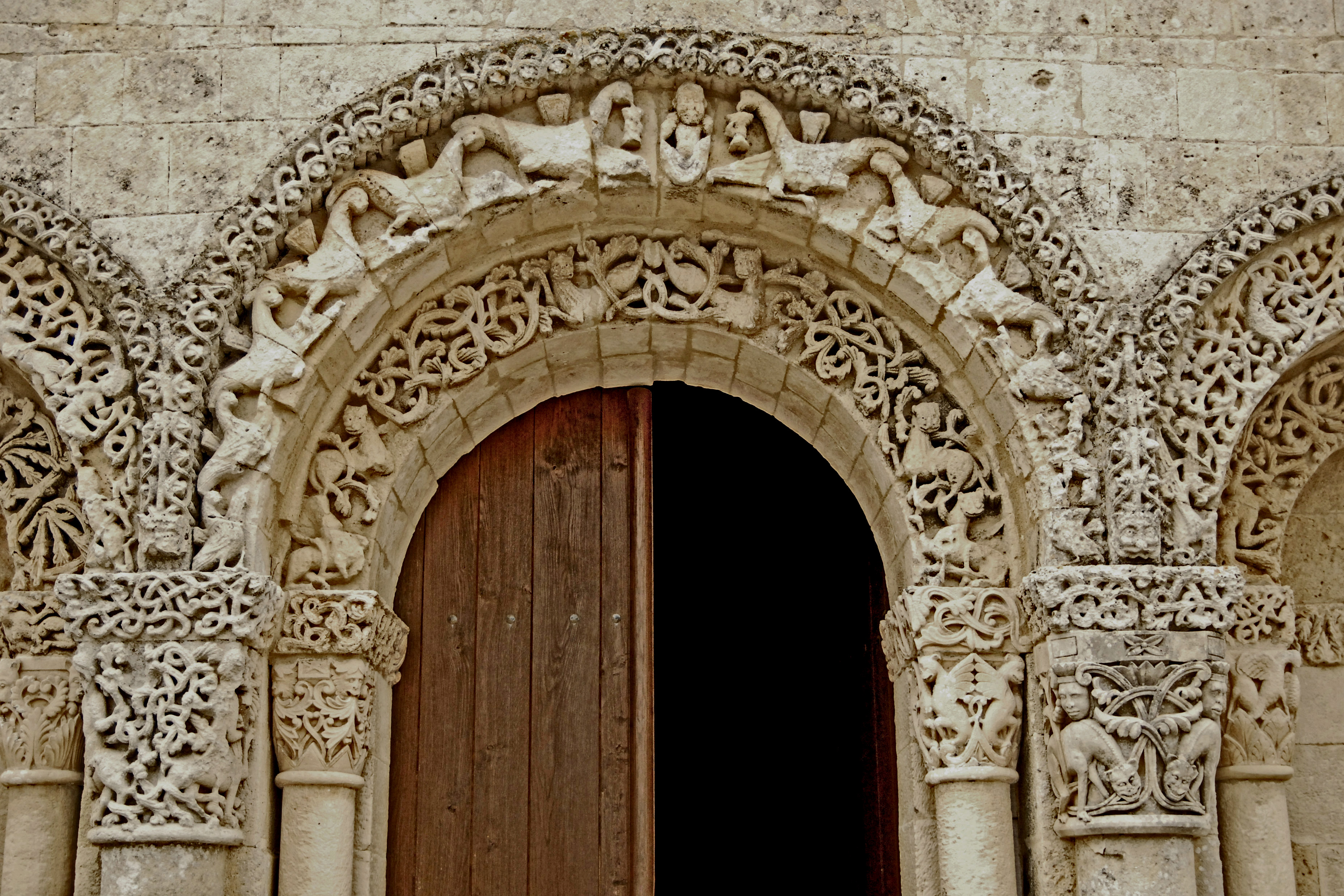 Notre-Dame Corme-Écluse, Hauptportal